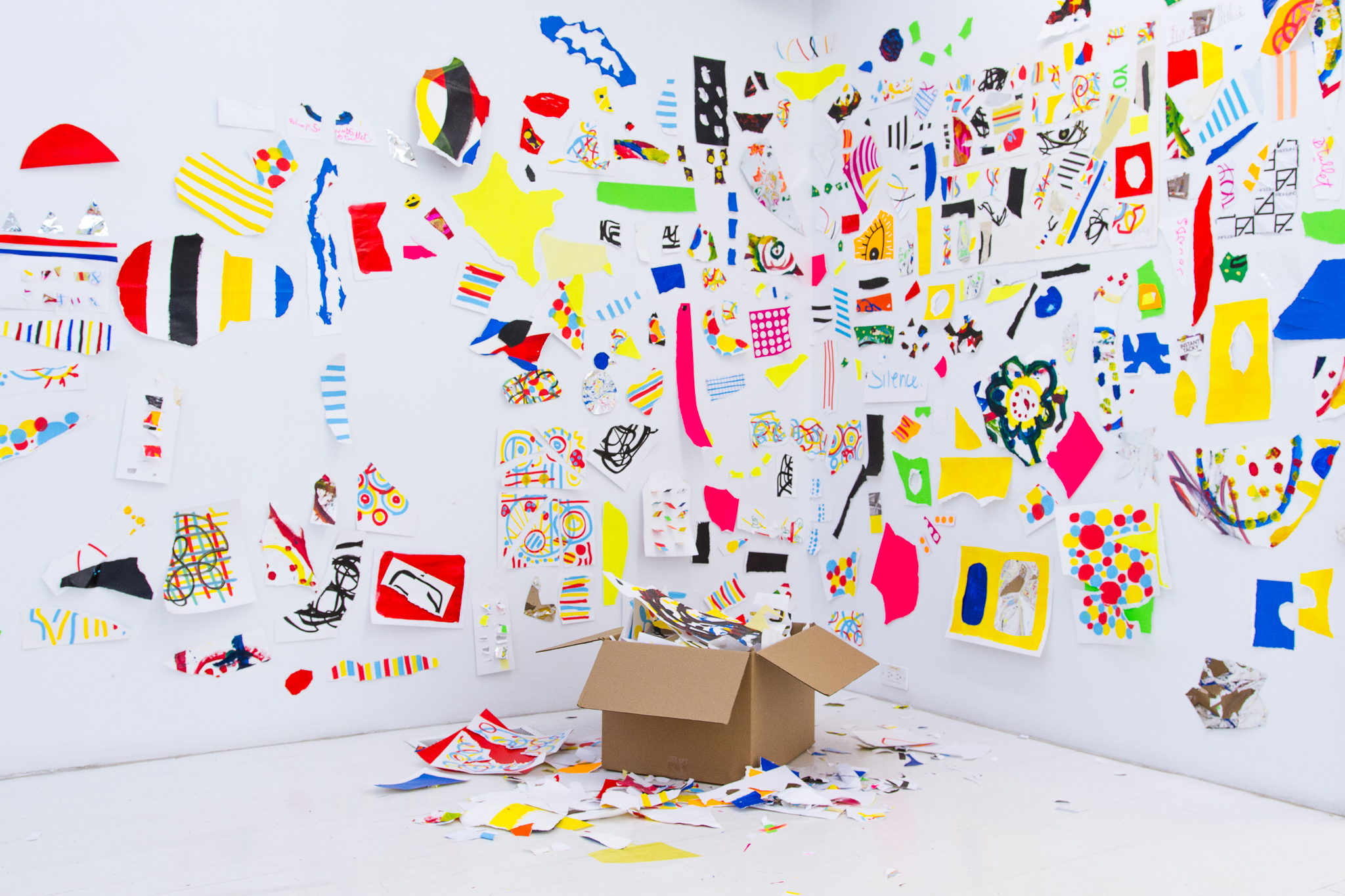 Qu'est-ce que l'expo idéale ?